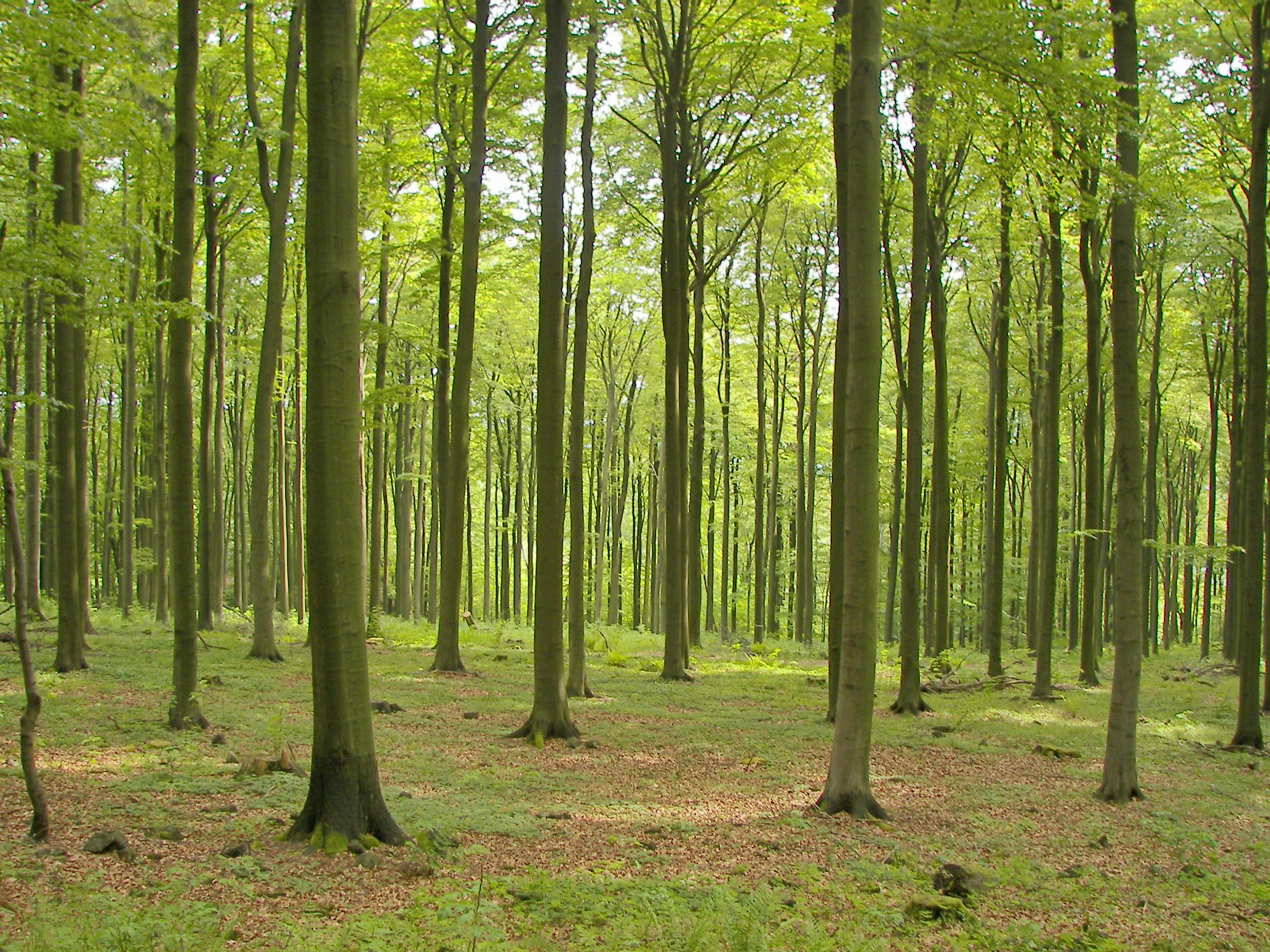 Buchenwald auf dem Hohen Meißner